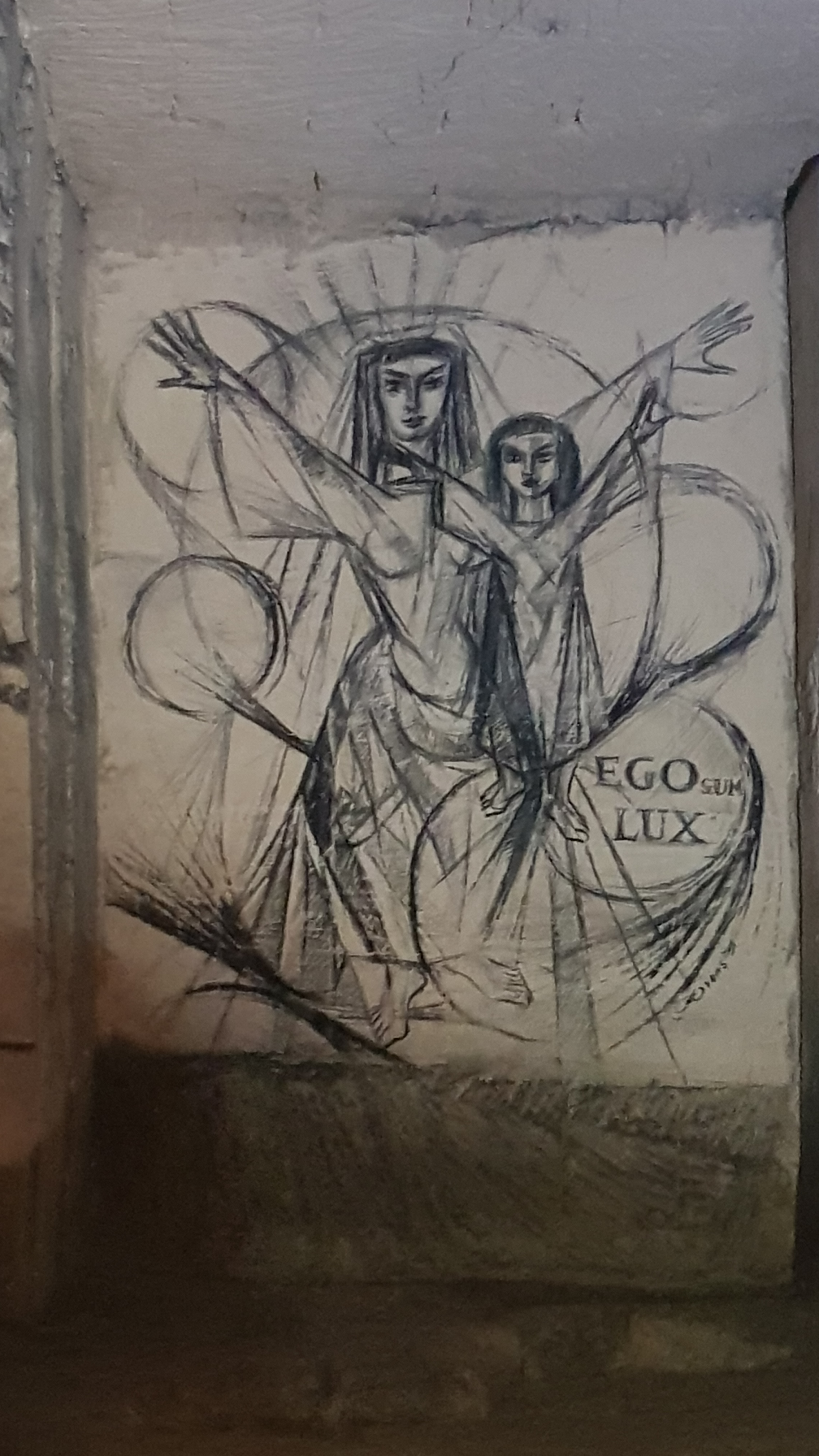 Noordelijk Gangenstelsel in de Sint-Pietersberg, Maastricht, Nederland